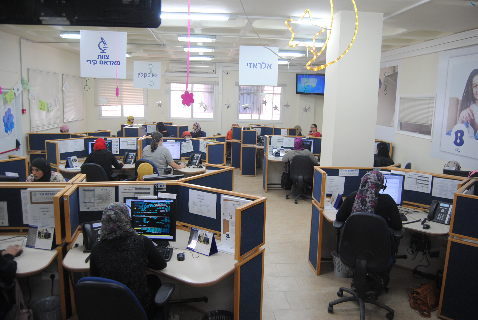 מוקד בזק הנמצא במסגד בחורה